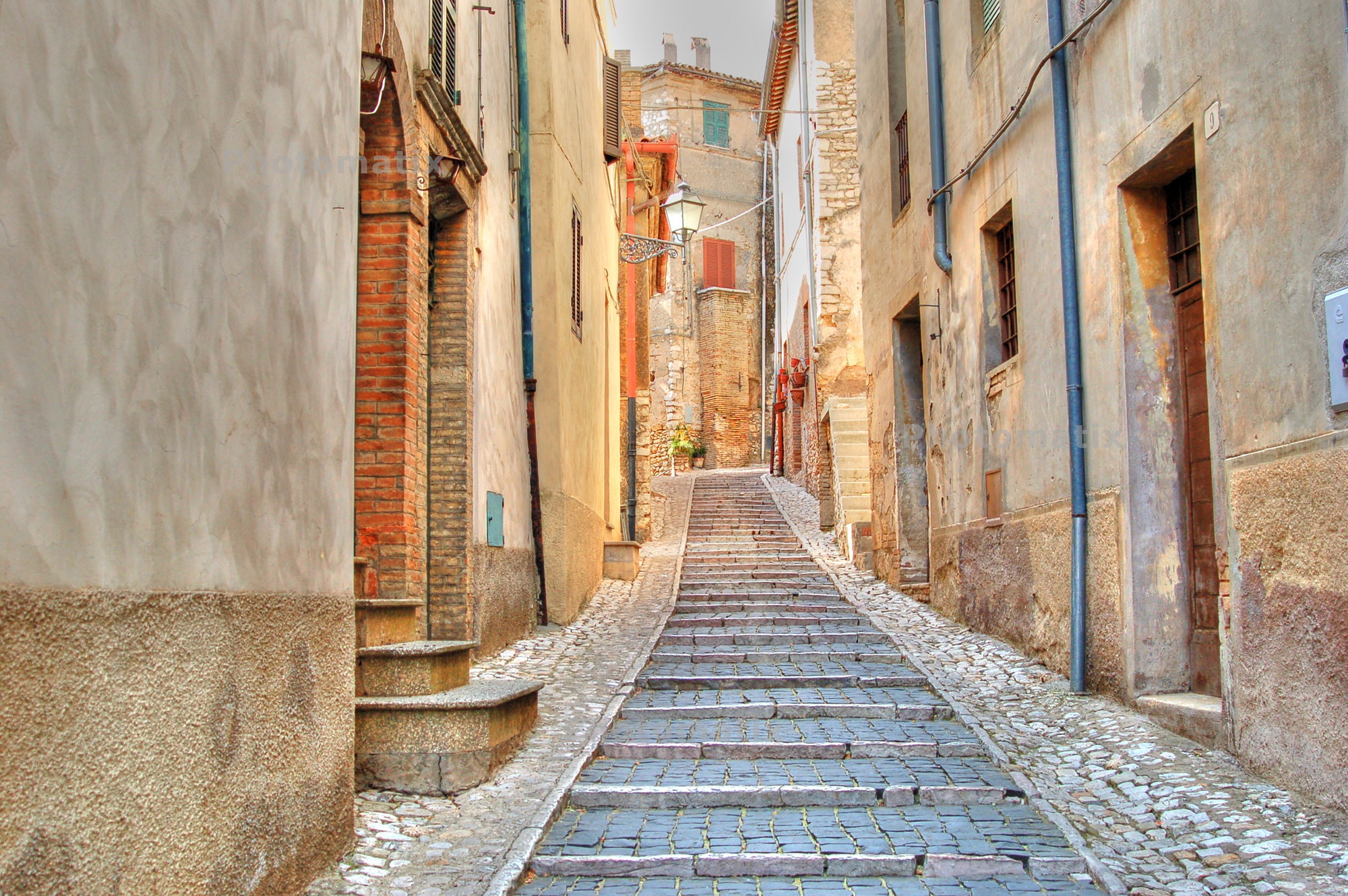 Casperia (RI), 2006